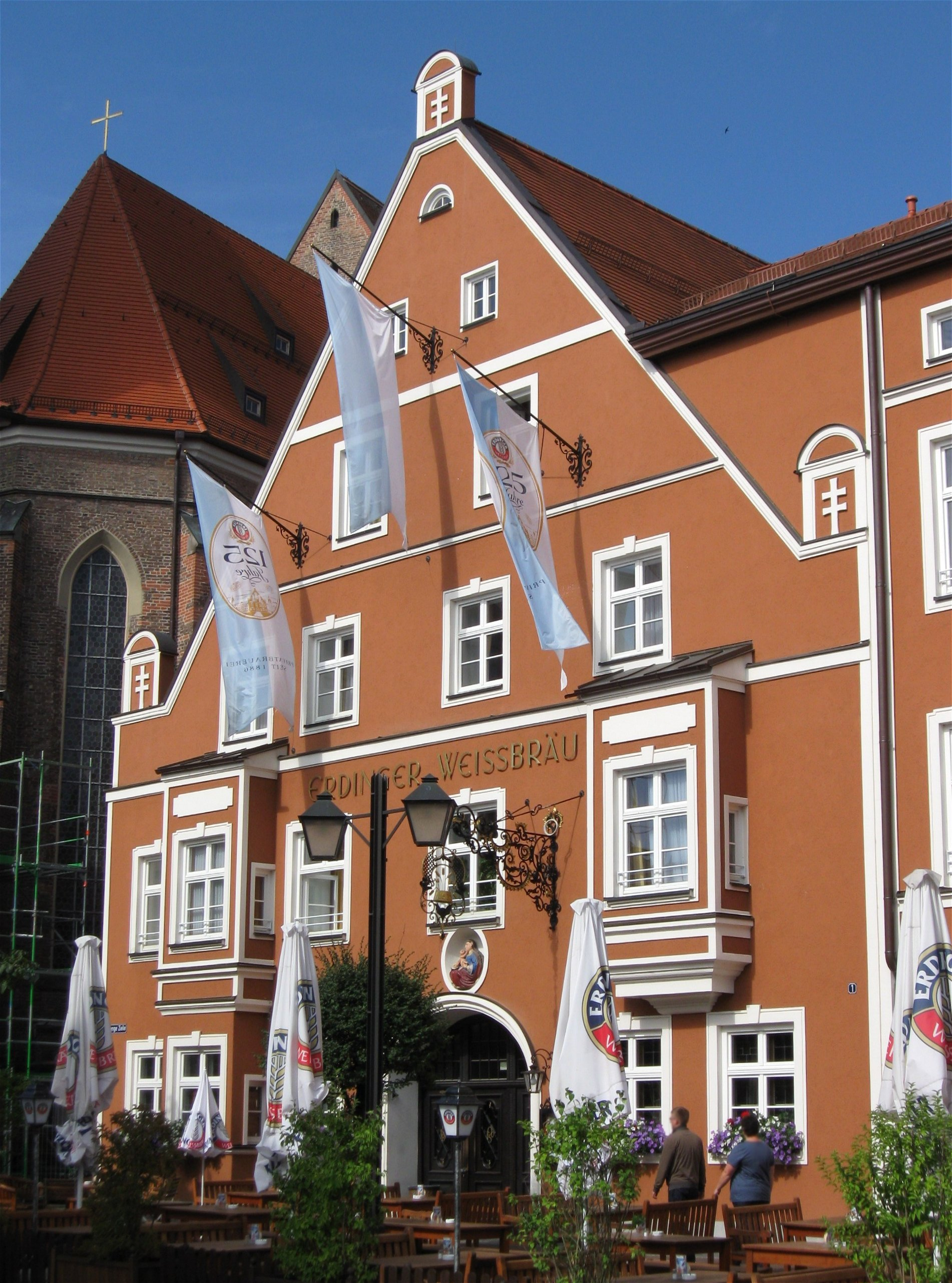 Erdinger Weissbräu, Lange Zeile 1; Gasthaus, giebelständiger zweigeschossiger Bau mit Steilsatteldach und zwei Erkern, 16./17. Jh. und Lange Zeile 3; Wohn- und Geschäftshaus, dreigeschossiger Traufseitbau mit Mezzanin und Erker, um 1890-1900 zusammen mit Nr. 4 errichtet, 1953 und später umgebaut.